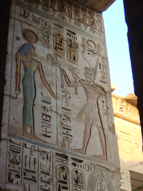 Dodentempel Ramses III in Medinet Haboe eigen foto januari 2007 Medinet Haboe Ben Pirard